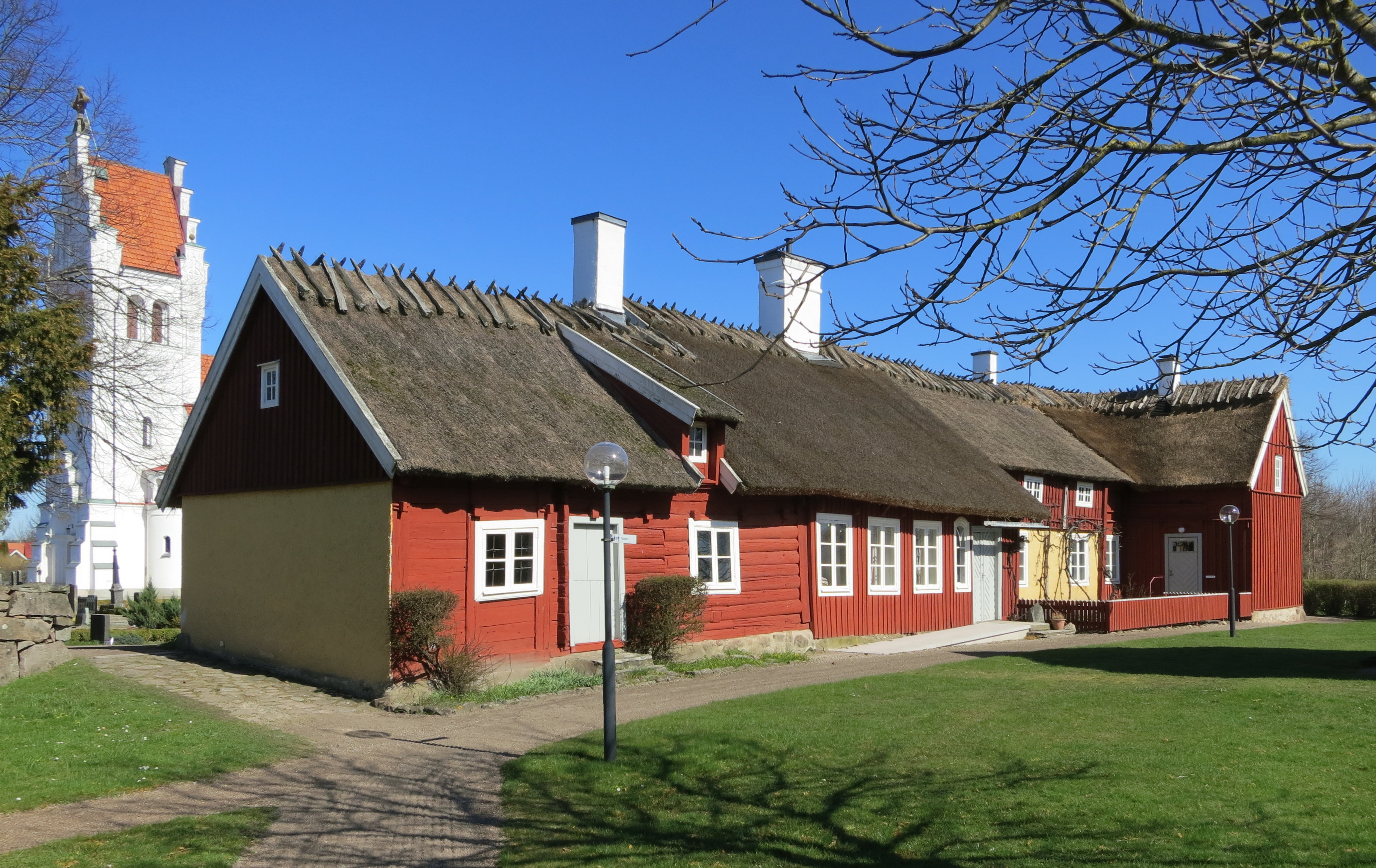 Österslövs gamla prästgård, mars 2014